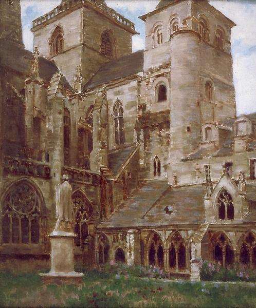 Joseph-Félix Bouchor : le cloître de Tréguier